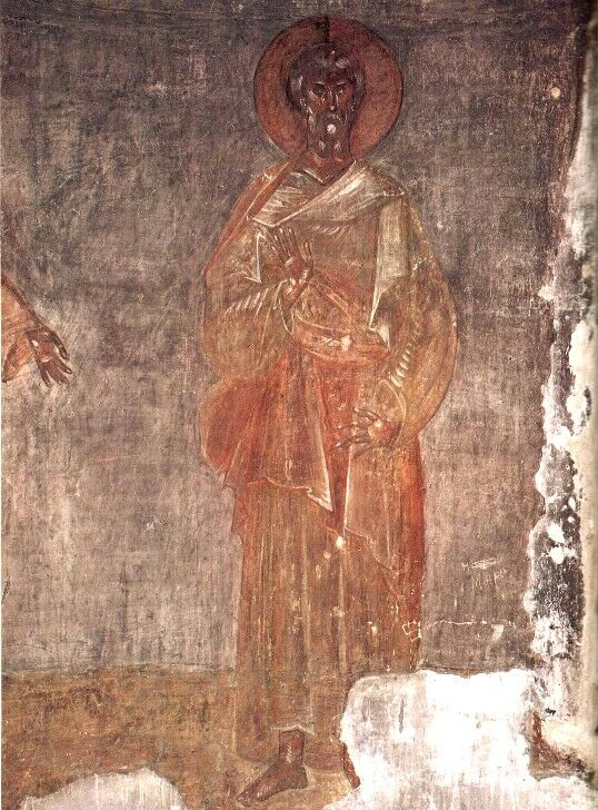 Фрески церкви Спаса на Ильине